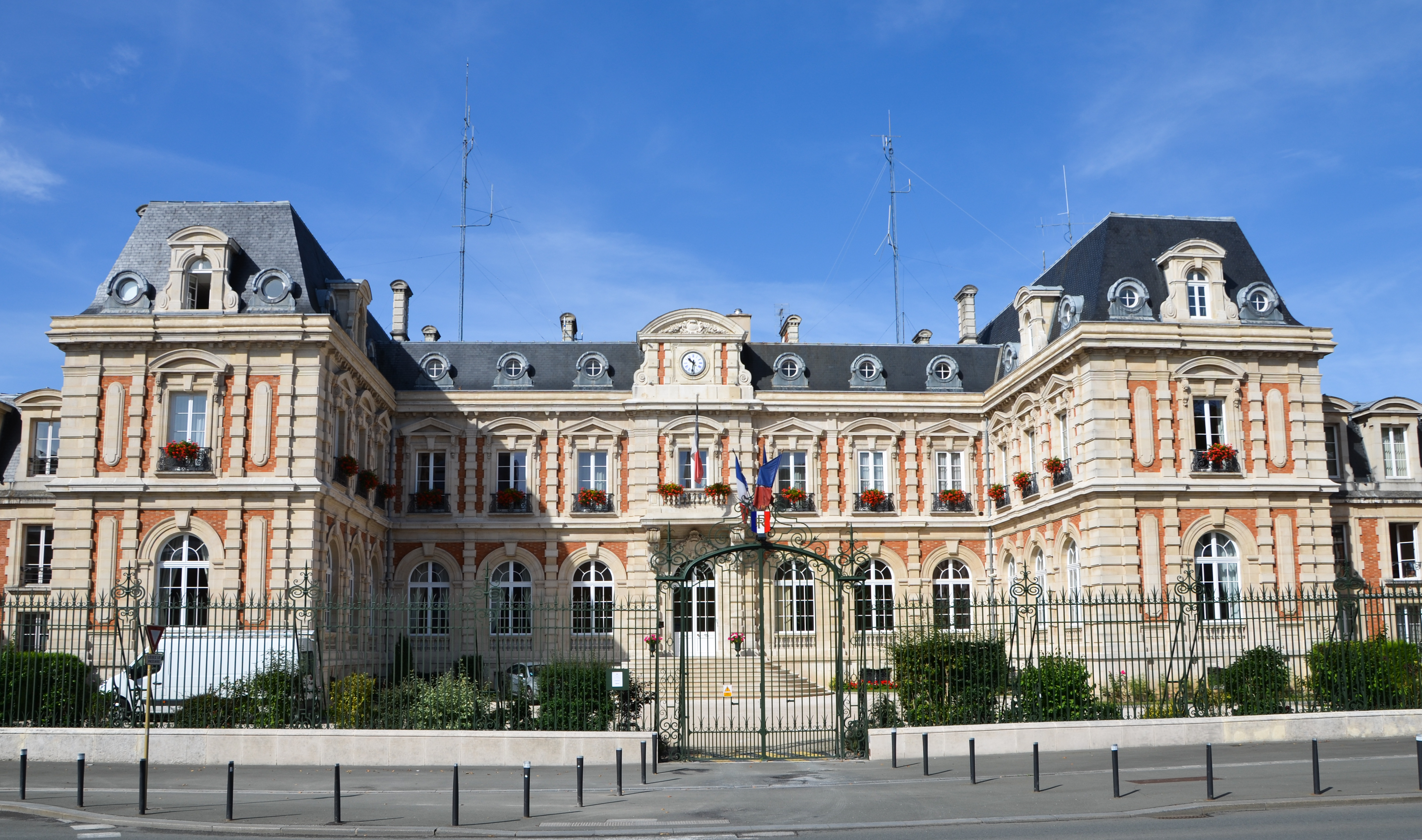 La préfecture de Chaumont, Haute-Marne, Champagne-Ardennes, France